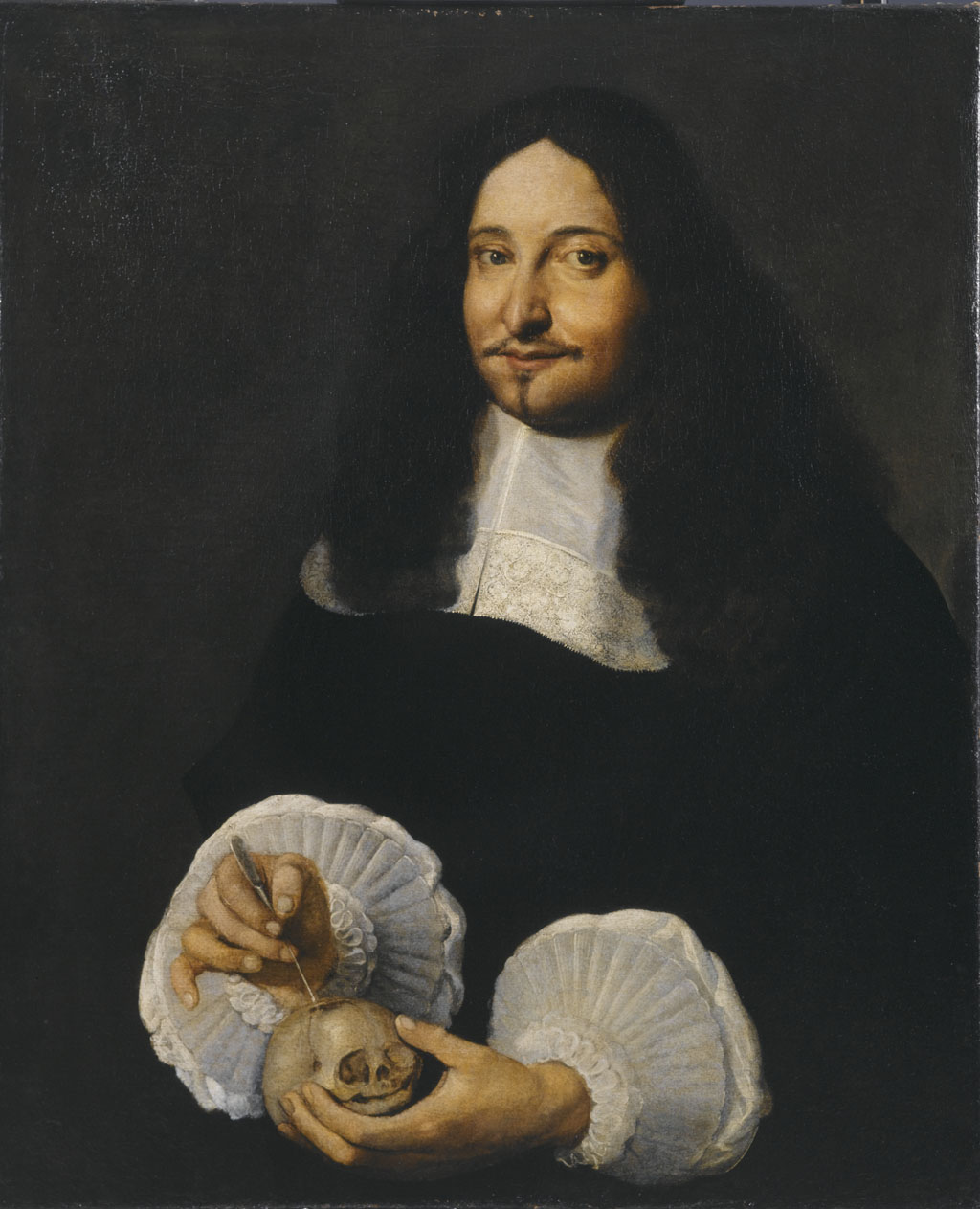 schilderij; Collegium Medicum; portret; portret Amsterdam; mansportret; Van Horne, Johannes